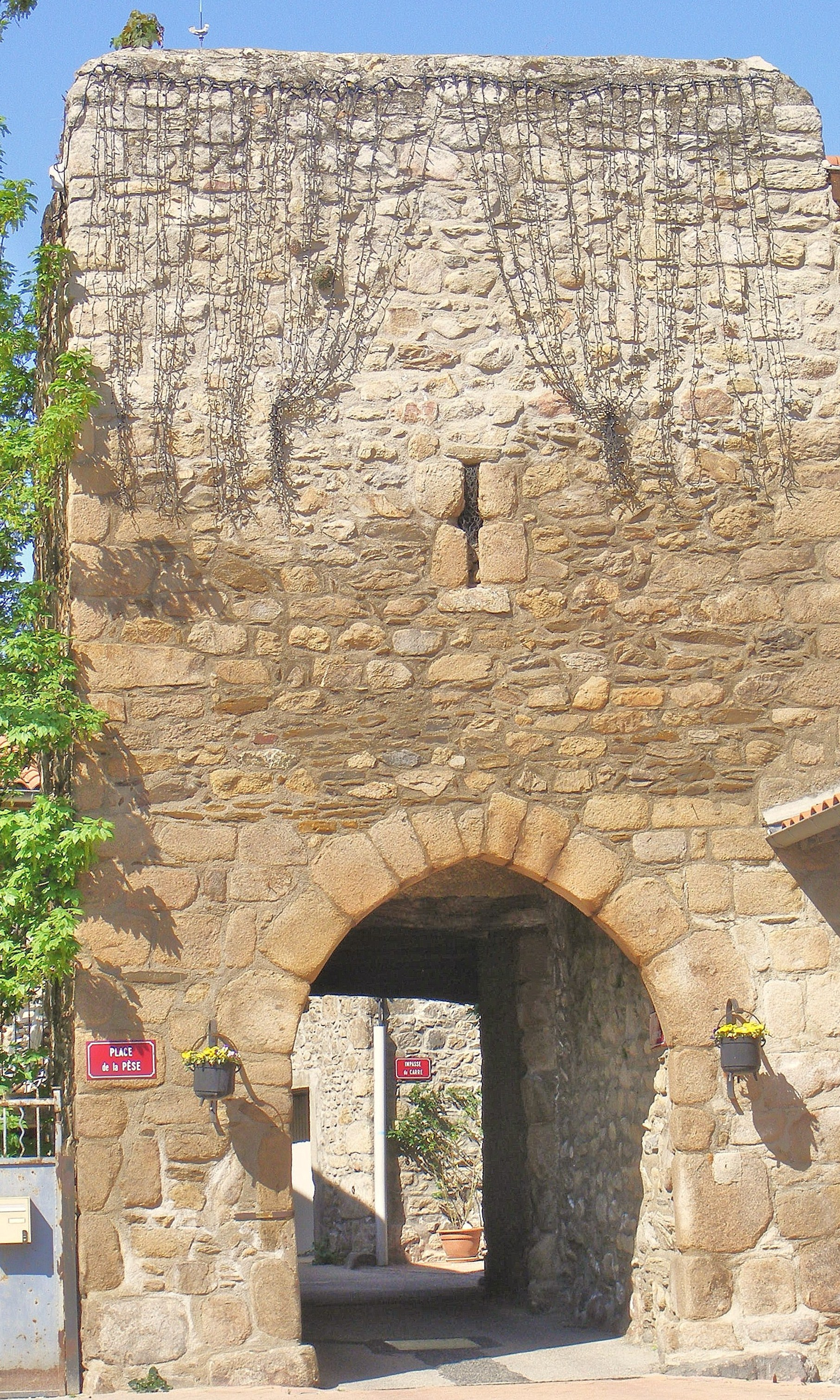 Porte médiévale ( début du XIII° siècle)